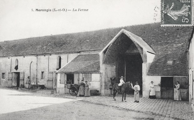 Morangis dans le Hurepoix (Essonne, anc. Seine-et-Oise), la Ferme, carte postale ancienne non grevée de droits.